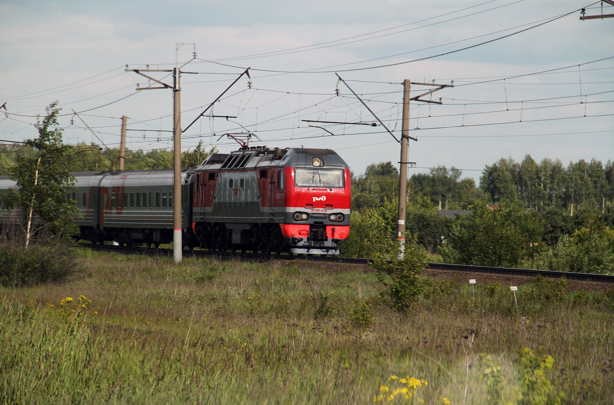 Электровоз ЭП2К-234 с пассажирским поездом 107Й Уфа - Санкт-Петербург, ст.Козловка, железнодорожная линия Узуново — Рыбное